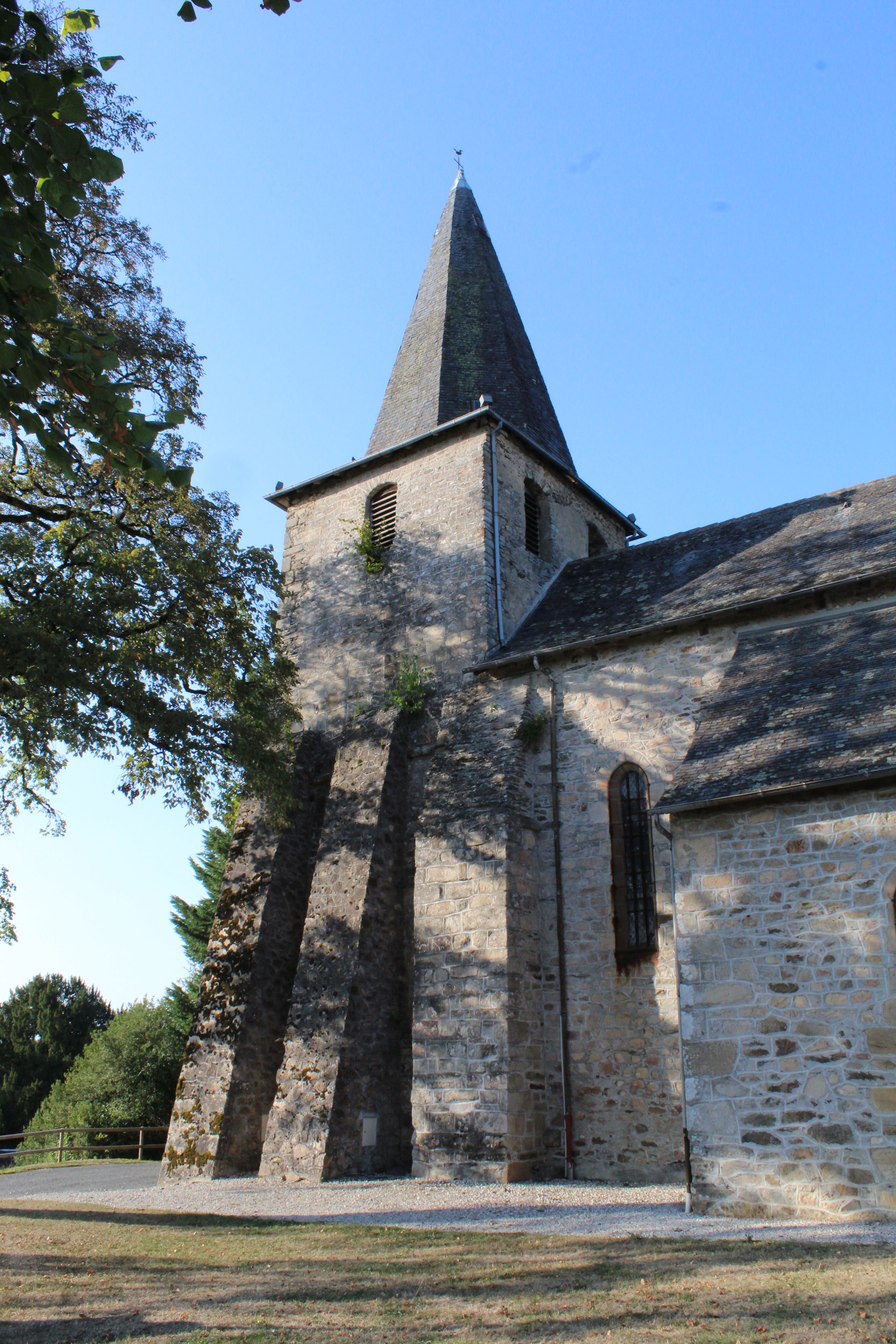 L'église.